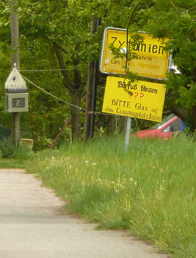 Ortsschild von Zytanien auf dem Zuweg